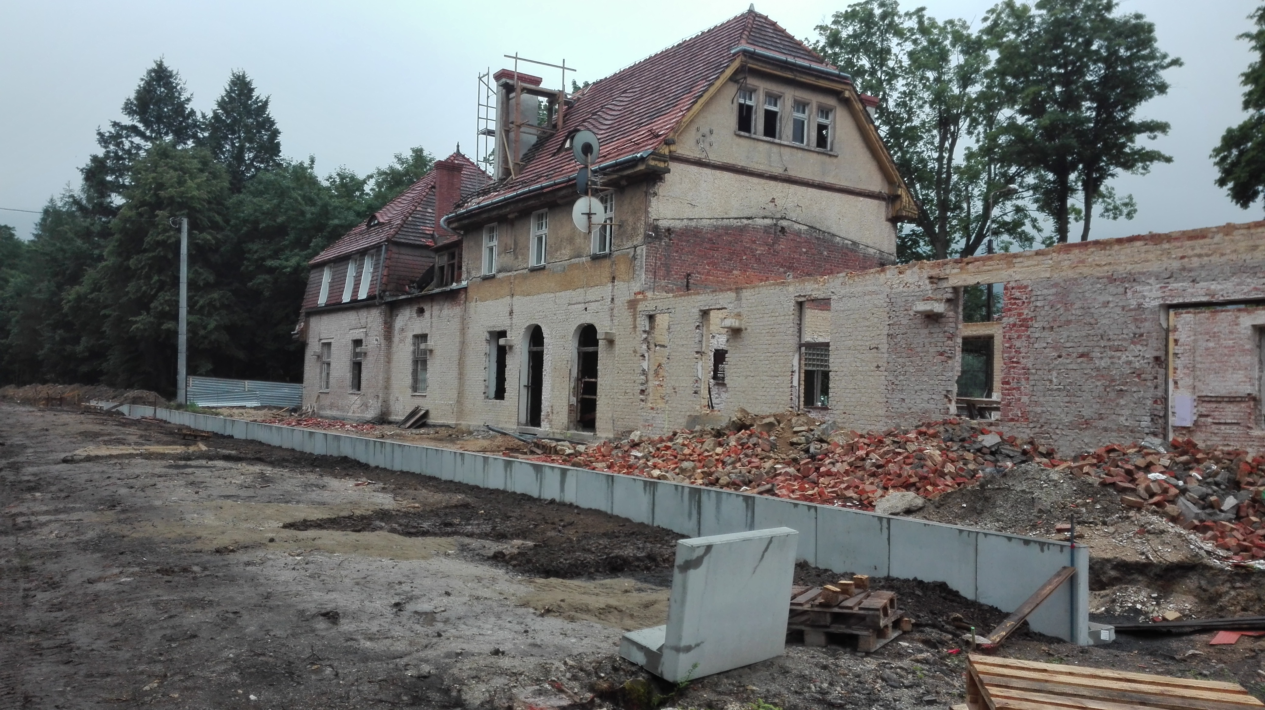 Budynek dworca w Świeradowie Zdroju w trakcie prac remontowych.